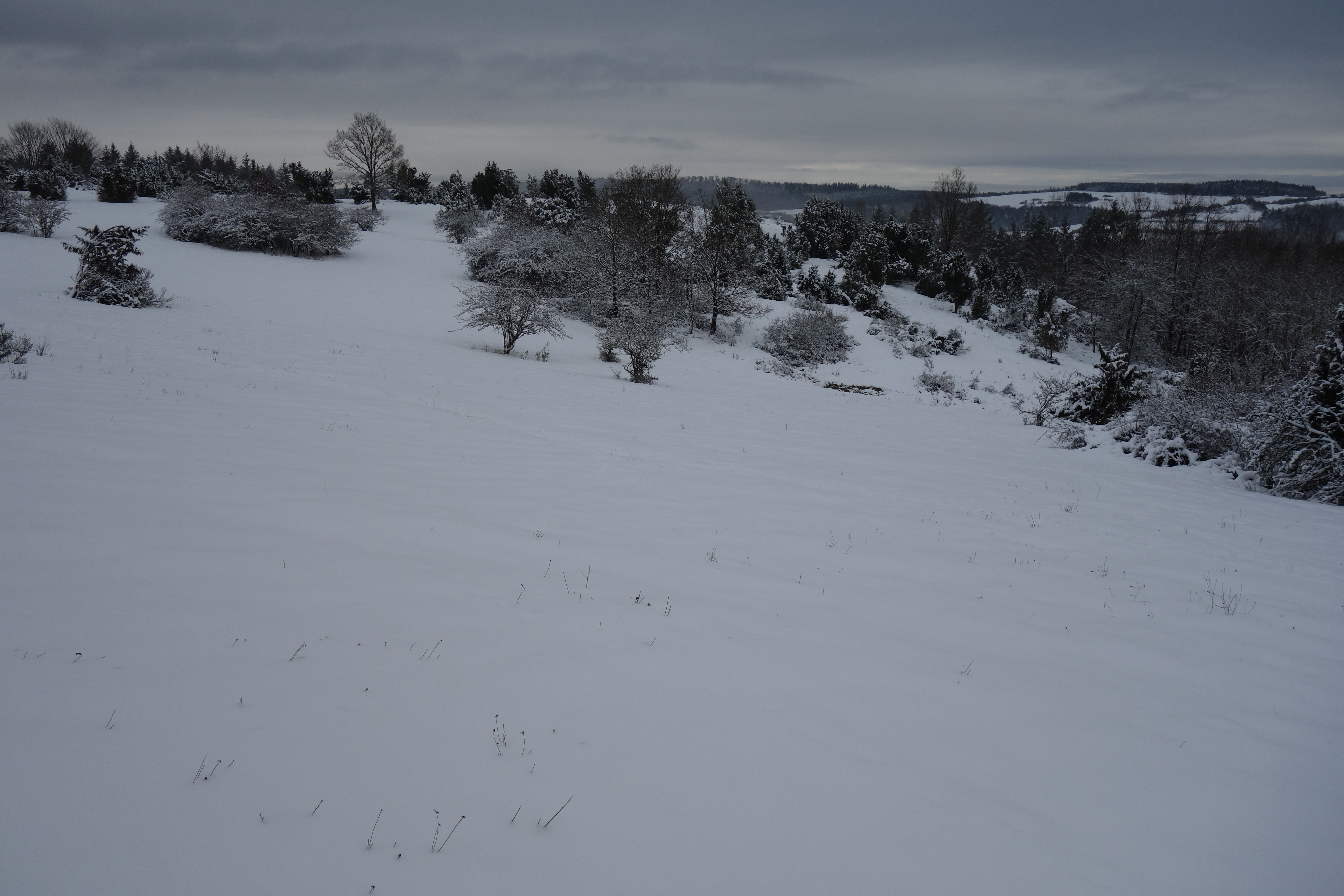 Naturschutzgebiet Heckenlandschaft Braunshausen im Winter bei über 20 cm Schnee.